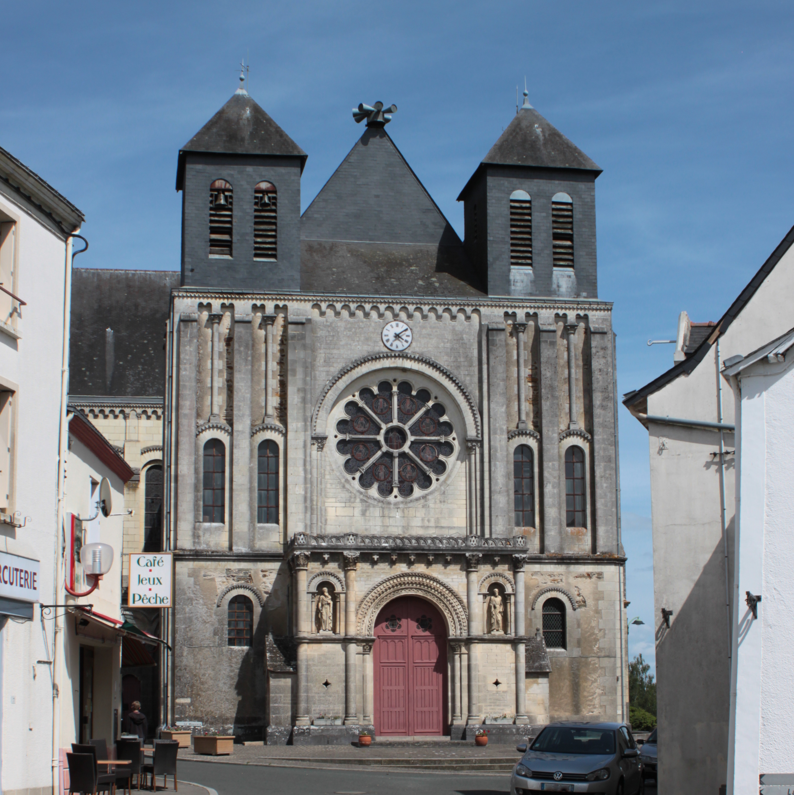 Église Notre-Dame de l'Assomption, 1883-1887-1936, Riaillé.